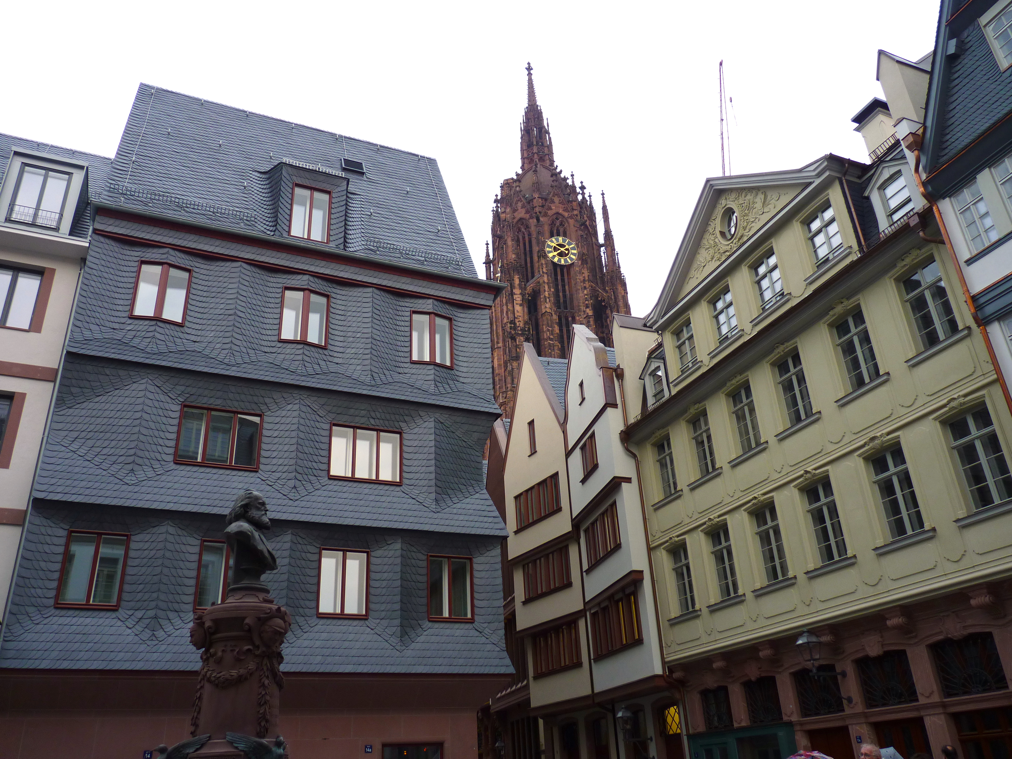 Links: Markt 14 Neues Paradies Rechts: Markt 13 Grüne Linde (Nachbau), Markt 11 Kleiner Vogelsang (Doppelhaus)